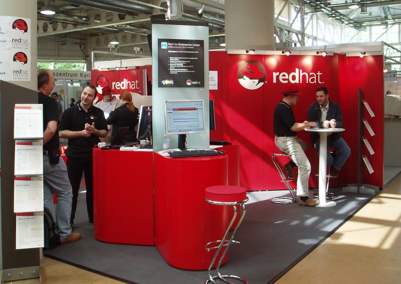 RedHat auf dem Linuxtag 2004, selbst fotografiert